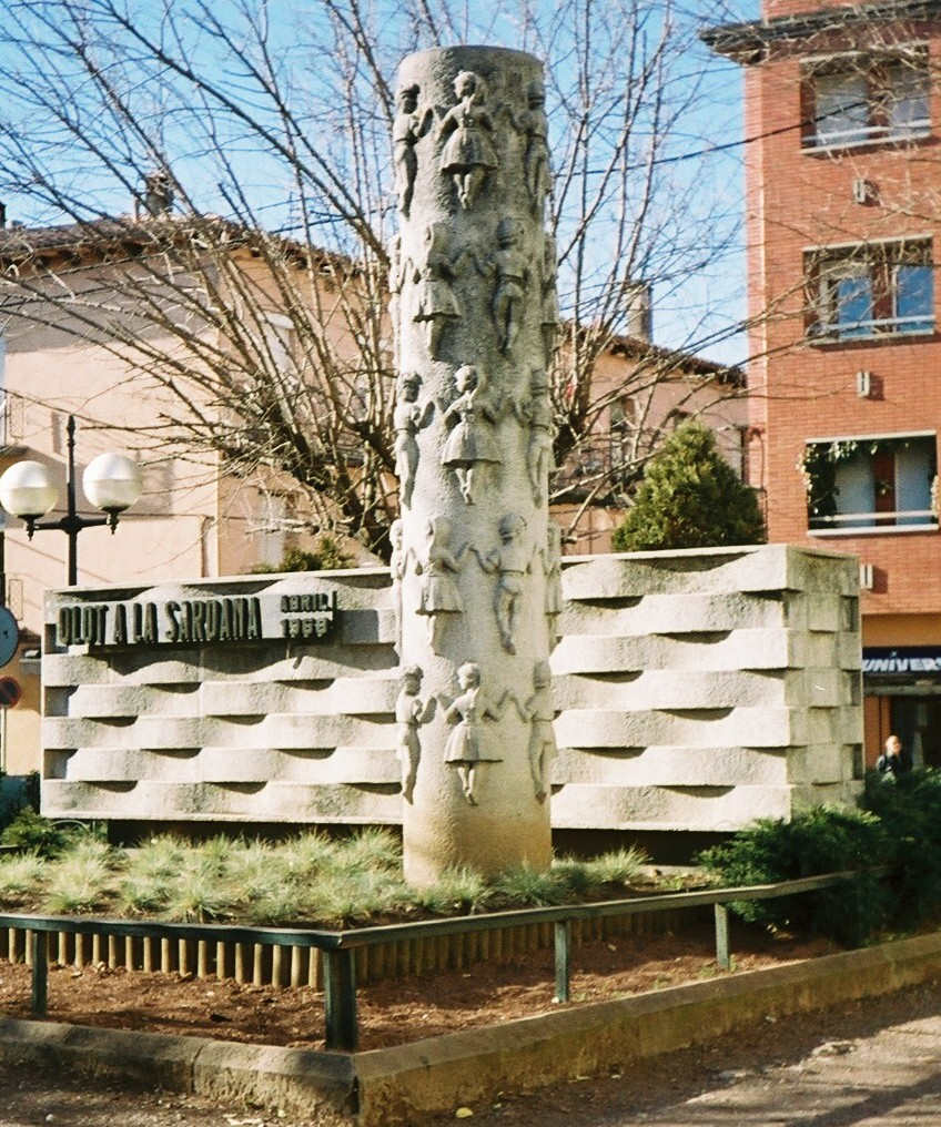 Sardana Monument at Olot (Version 2 / extract